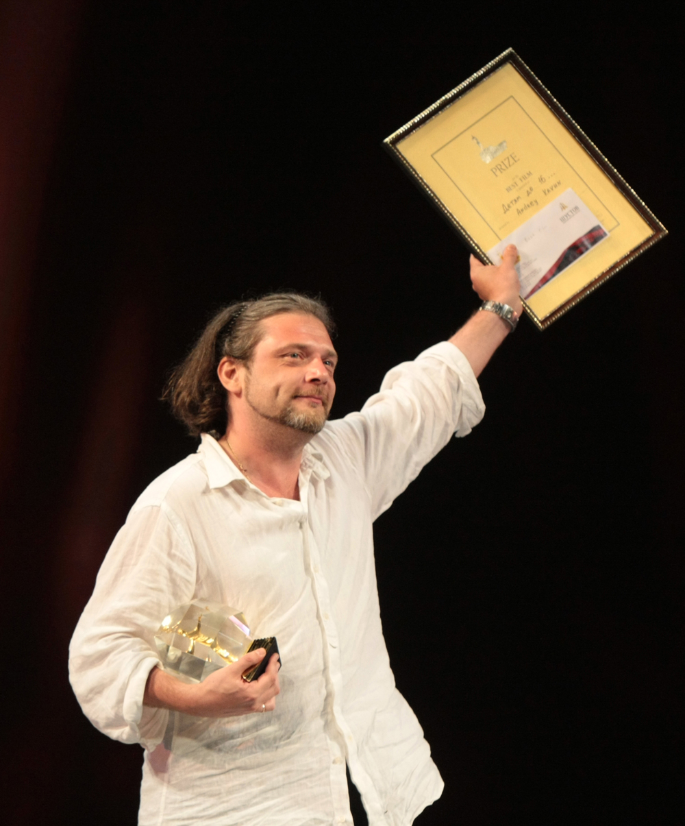 Режиссер фильм "Детям до 16..." Андрей Кавун получает главный приз Одесского международного кинофестиваля-2010